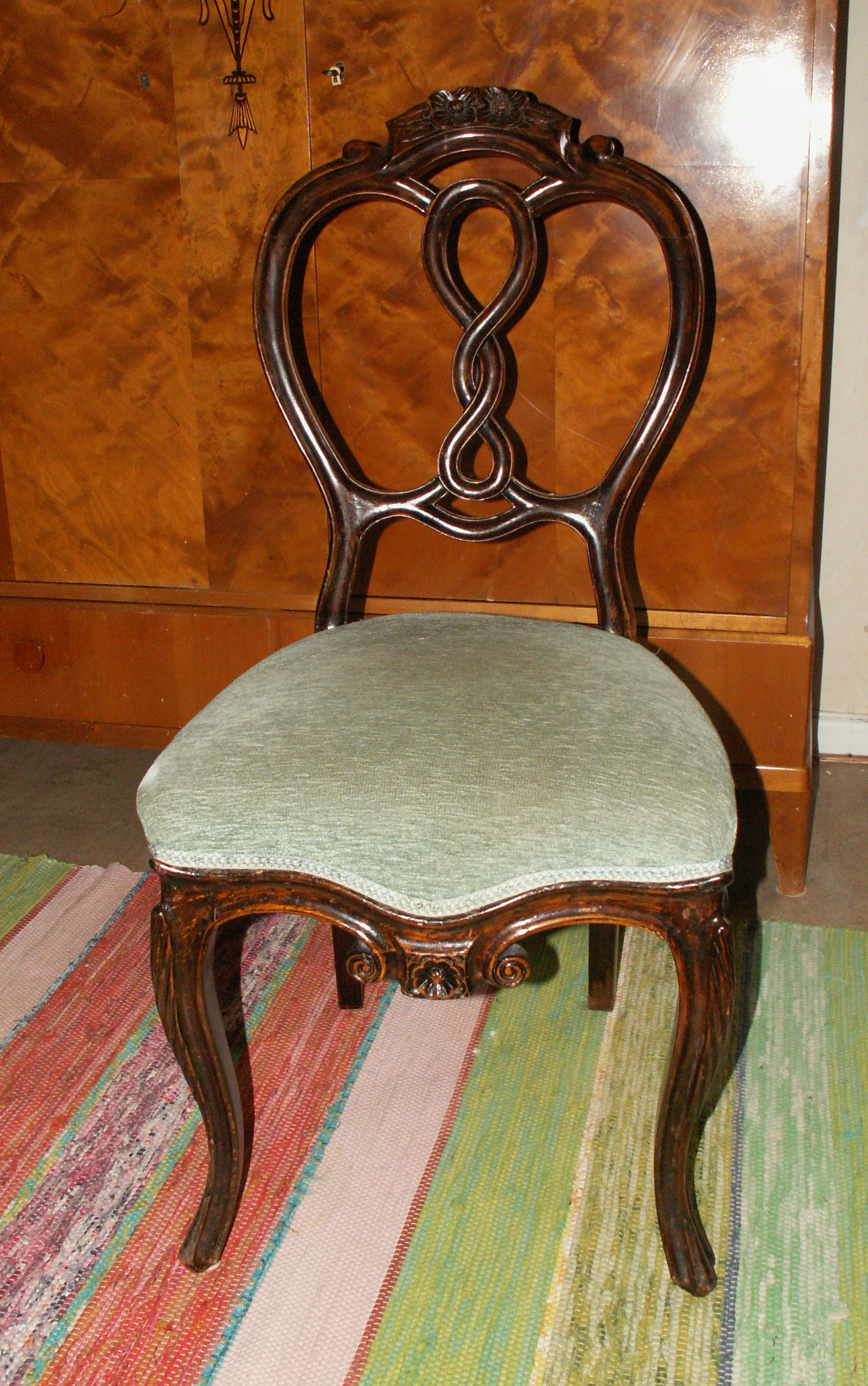 Göteborgsstol, tillverkad tidigt 1900-tal. Fotograferad i Högsered i västra Lindome.